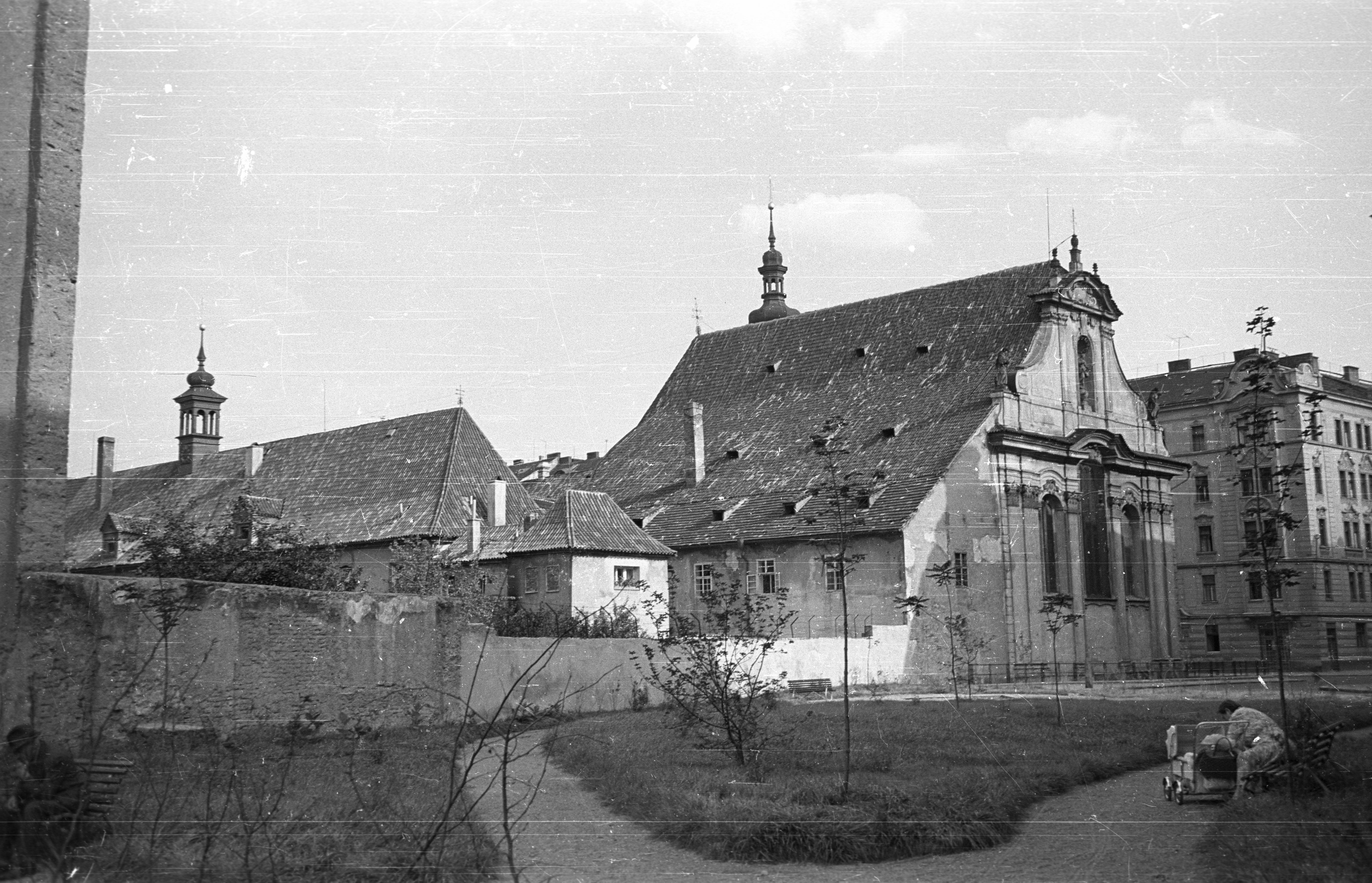 Szent Simon és Judás templom. Location: Czech Republik, Prague Tags: Czechoslovakia, church Title: Szent Simon és Judás templom.